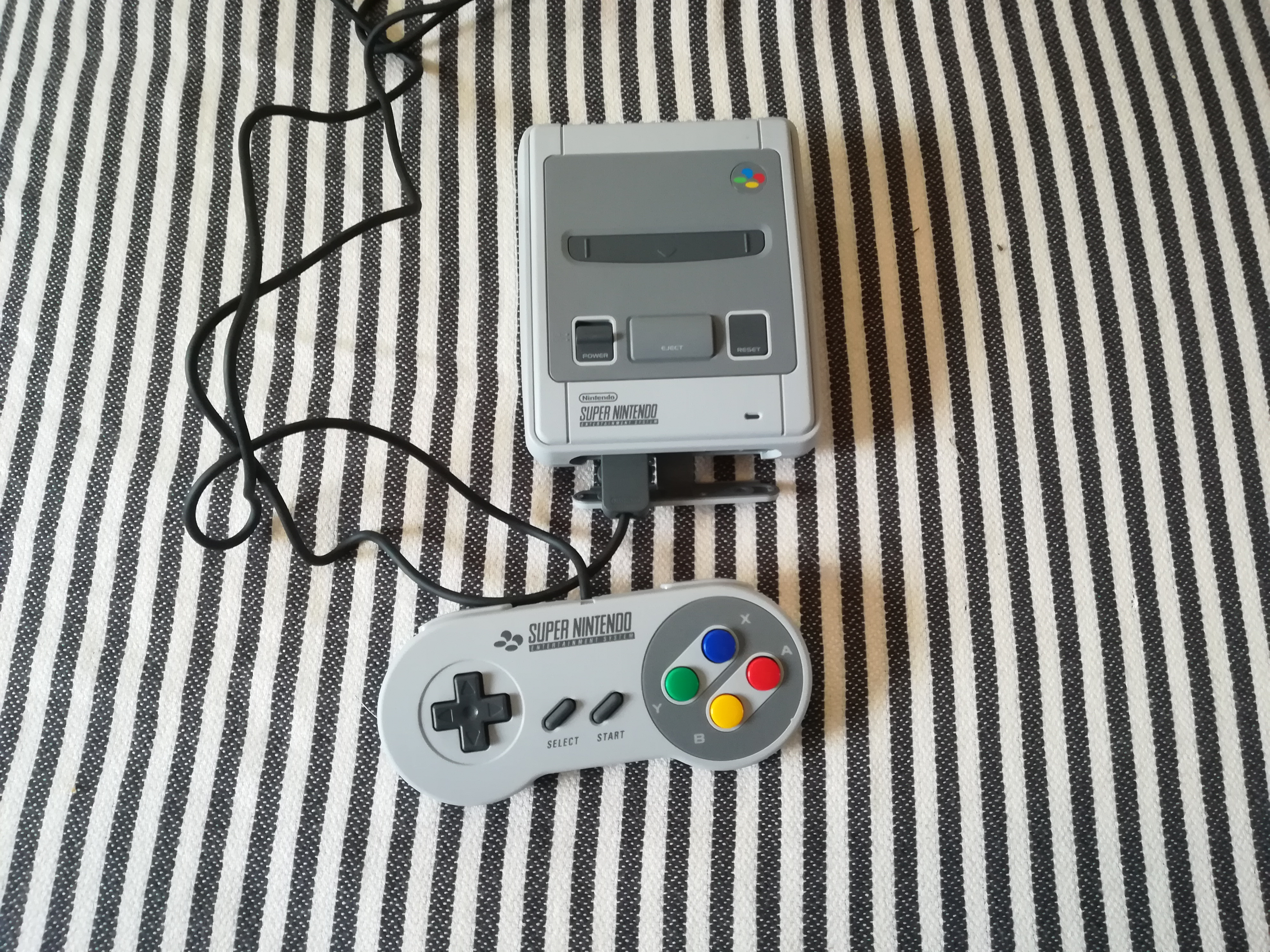 Nintendo Classic Mini: Super Nintendo Entertainment Systemin euroopan malli.